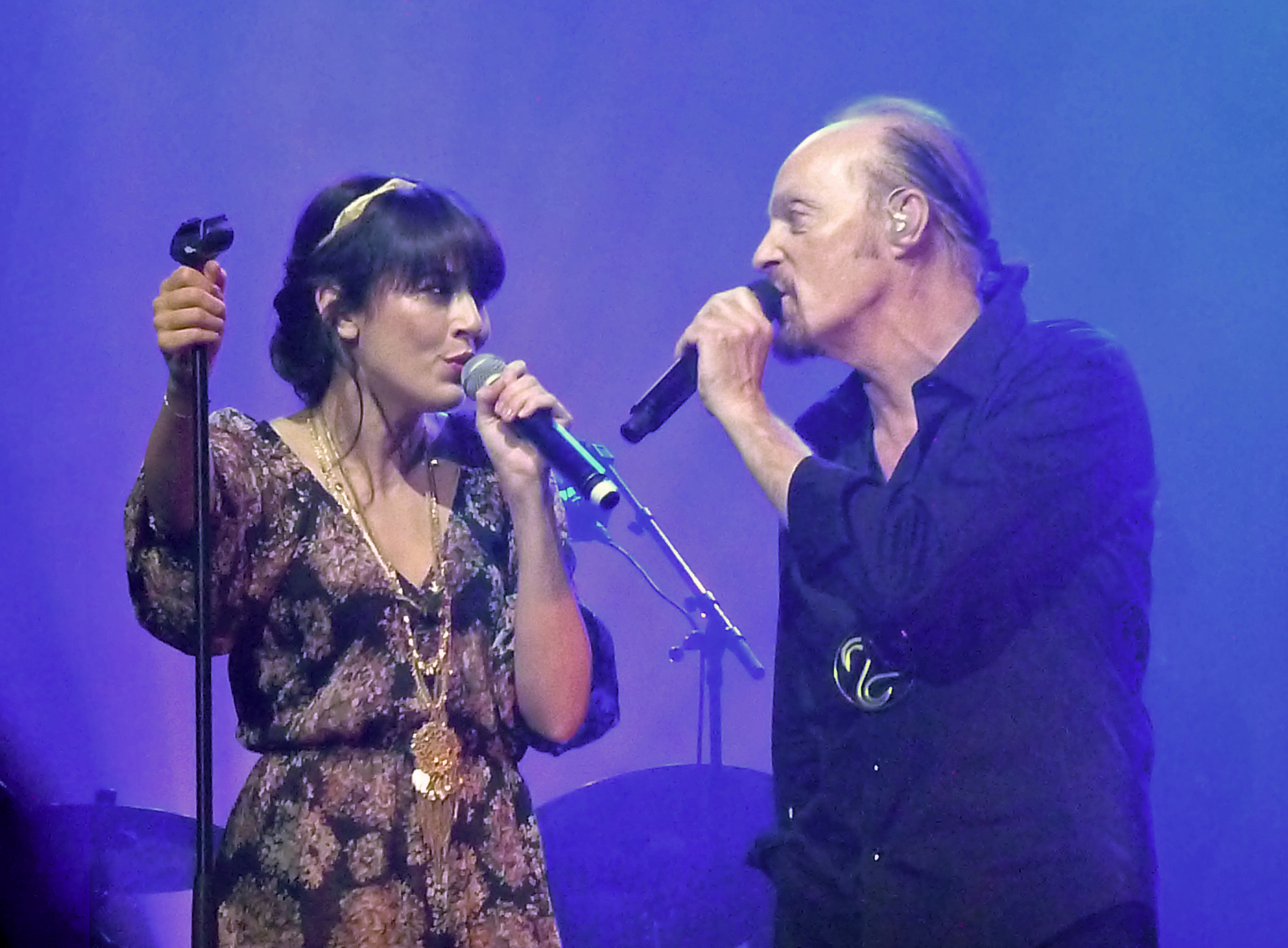 Alan Stivell à l'Olympia (Paris) le 16 février 2012 pour son concert anniversaire, en duo avec Nolwenn Leroy sur la chanson Brian Boru.